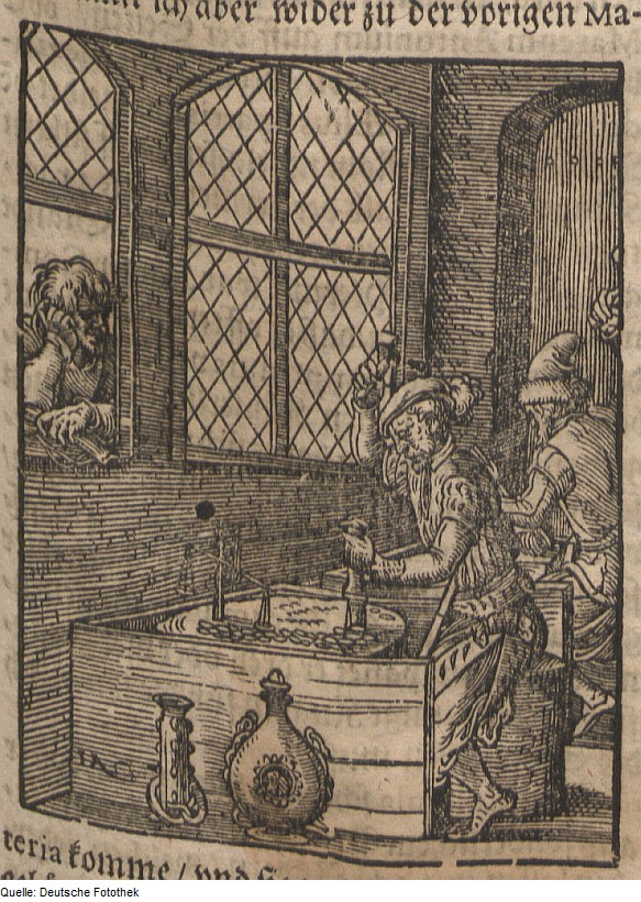 Original image description from the Deutsche Fotothek Ständebuch & Beruf & Handwerk & Münzpräger & Münzer